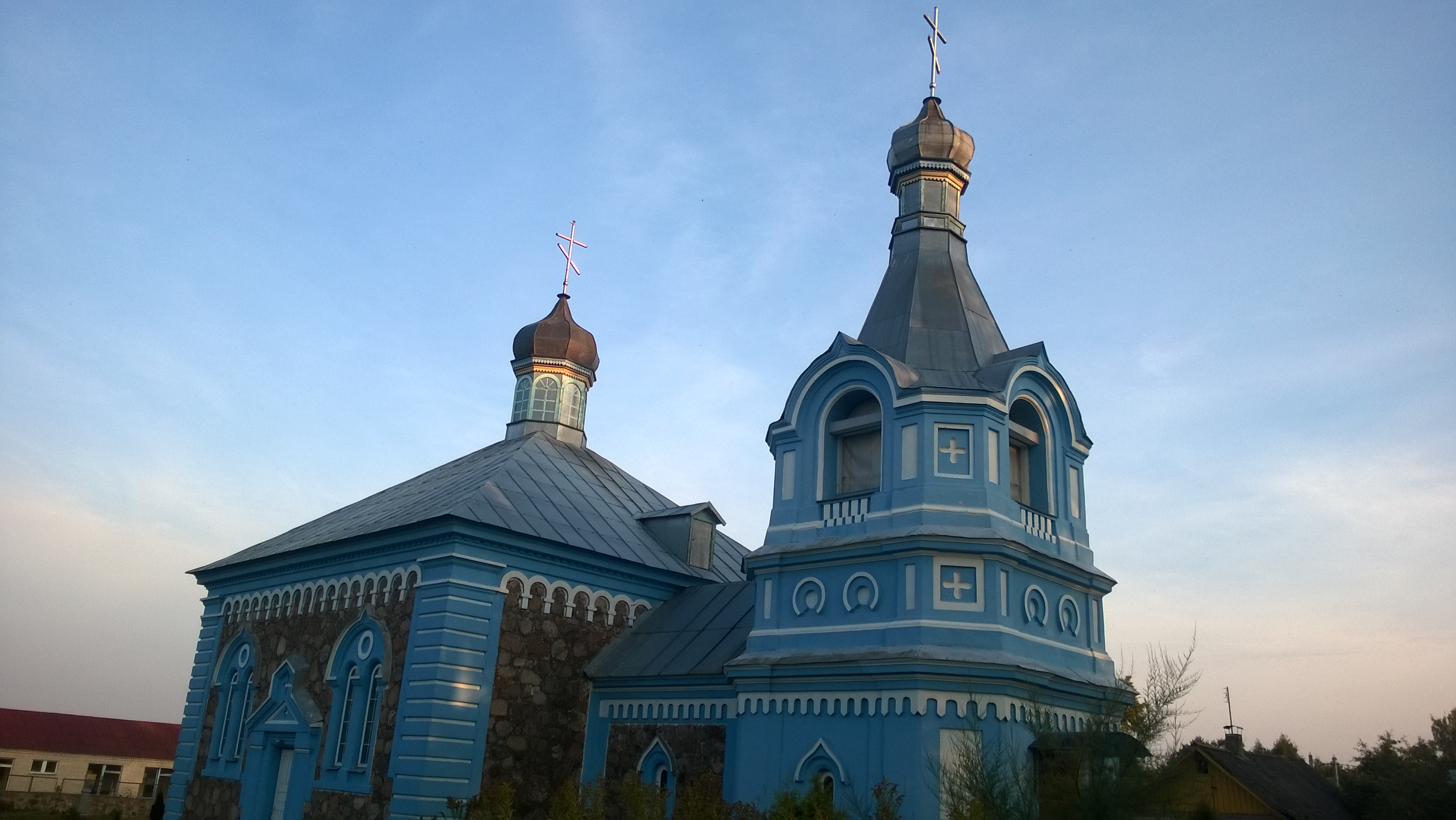 Орля, Belarus